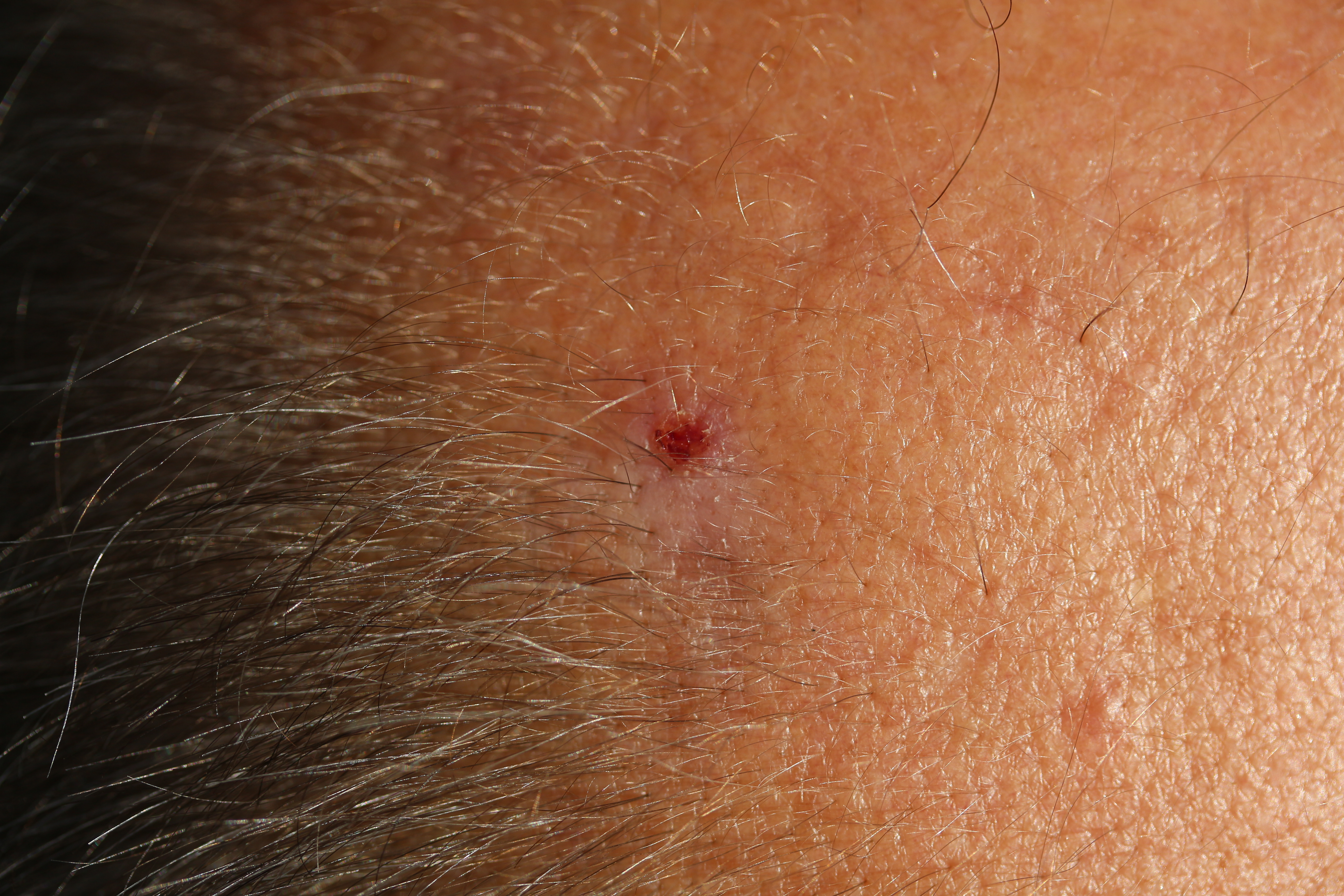 Aktinische Keratose auf dem Kopf im Bereich einer Glatze, zwei Bereich , oben ca 8mm Durchmesser um den Schorf und auf 5Uhr darunter ein Bereich 6mm Durchmesser am gleichen Tag entfernt.